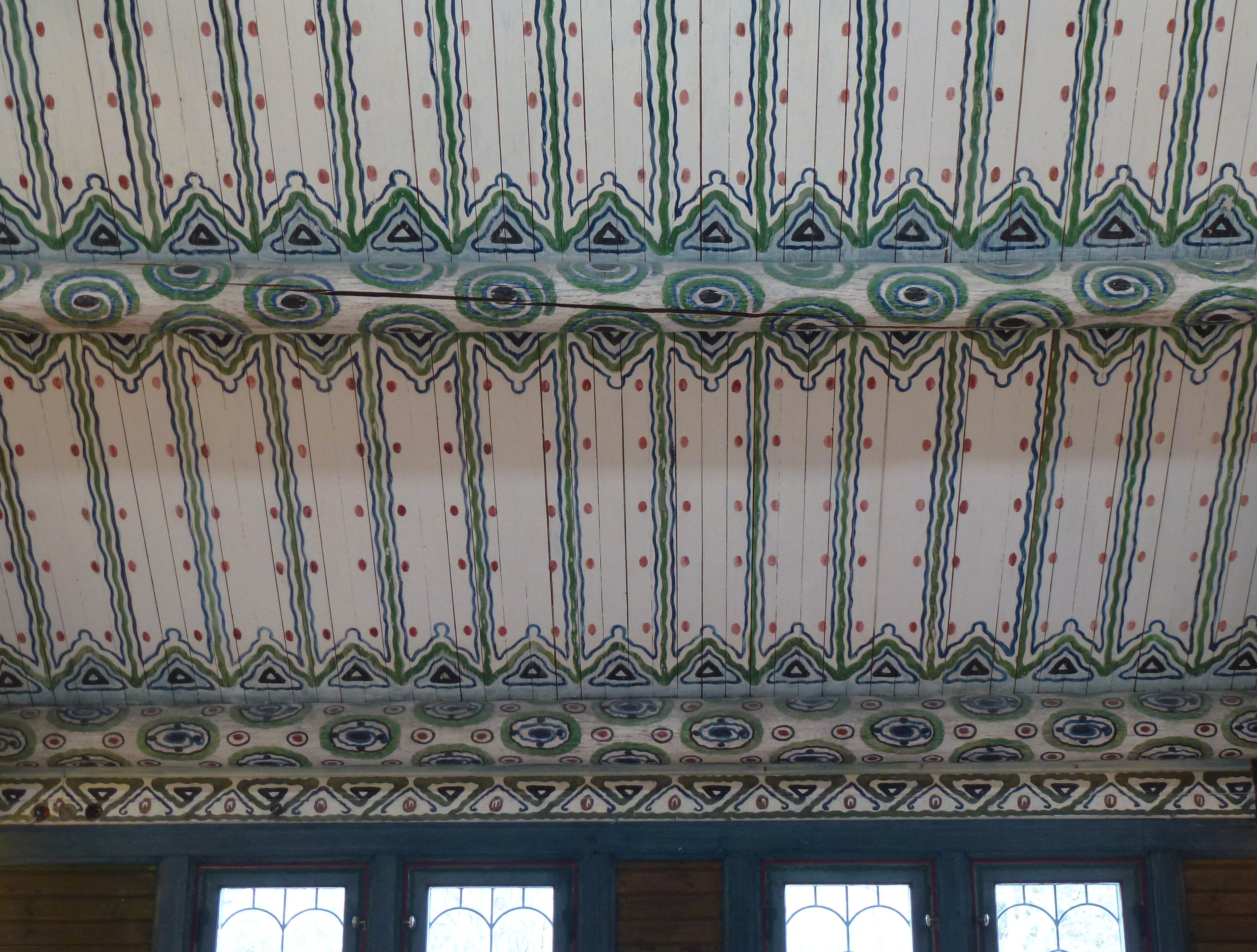 Storsalen i Storängens samskola